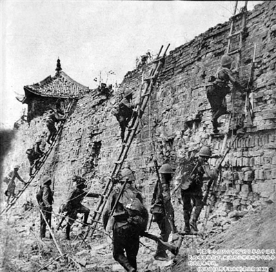 中文（中国大陆）: 日本军队在火力掩护下进攻宝山城